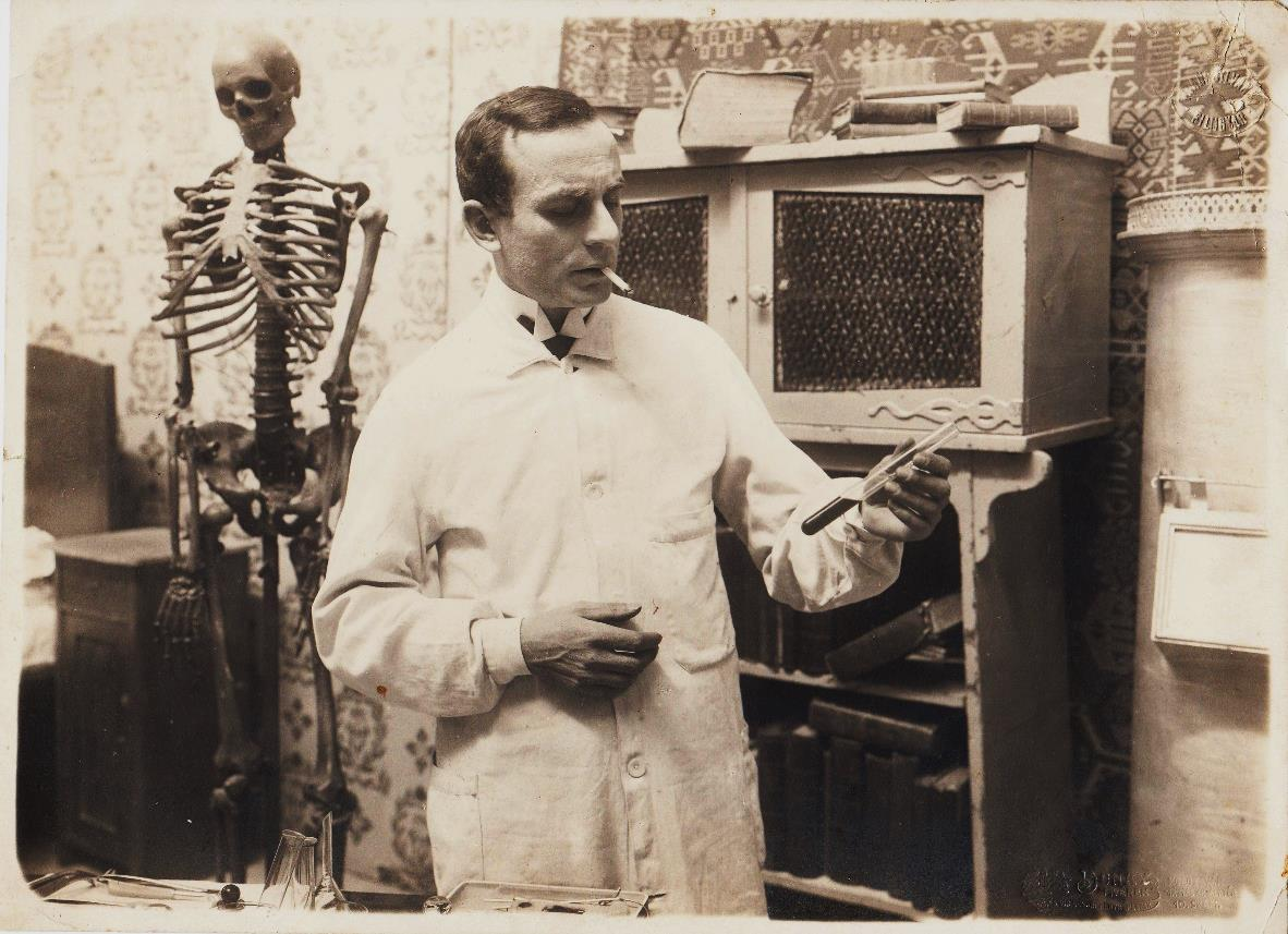 Kozma Hugó ( - 1956). A felvételt ismeretlen fényképész készítette 1918. június 12-én “A kancsuka hazájában” című kolozsvári némafilm forgatásán. Kozma Hugó a főszerepben Radomirovics Iván, orvostanhallgatót alakítja. A film további szereplői: Izsáky Margit, Nagy Adorján, Réthely Ödön, Szakács Andor, Dezséri Gyula, Várady Miklós, Fekete Mihály, Sebesi László, Berky József, Bánhidy József, Fajk Rózsi, Koller János, Domokos Ferenc, Németh József